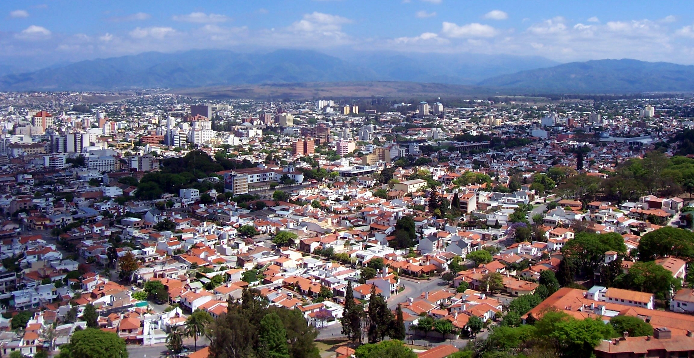 Panorámica Ciudad de Salta